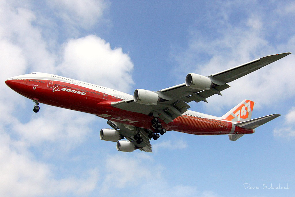 747-8i Wide Angle